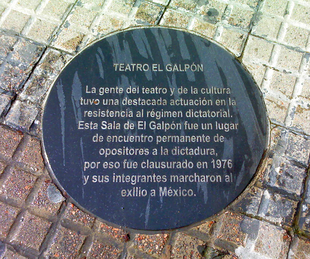 Placa de la marca de la memoria frente al teatro El Galpón de Montevideo